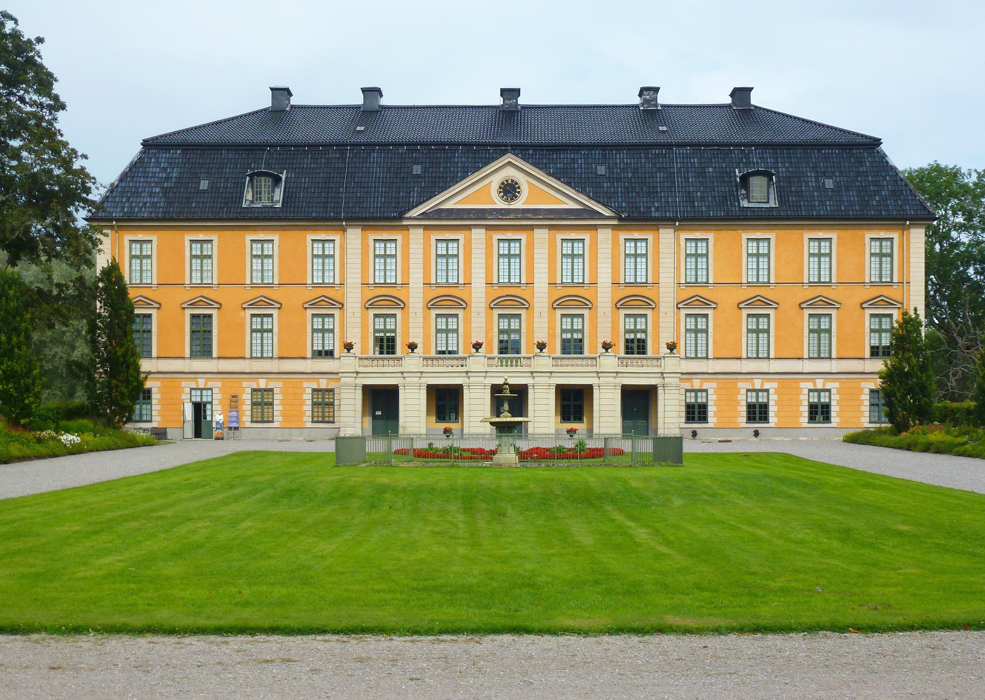 Nynäs slott, huvudbyggnad